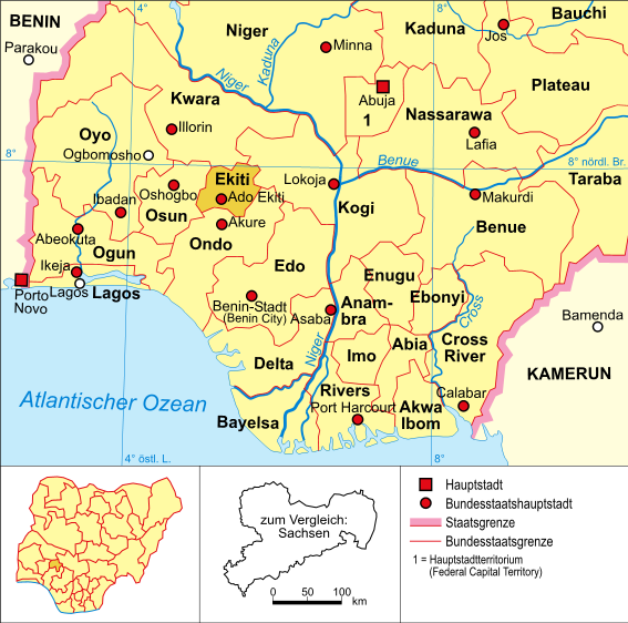 Politische Karte Nigerias (Bundesstaat Ekiti hervorgehoben)